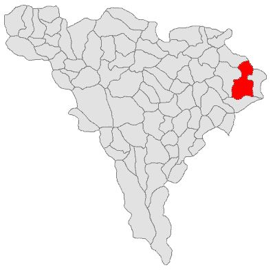 Categorie:Hărţi ale judeţului Alba